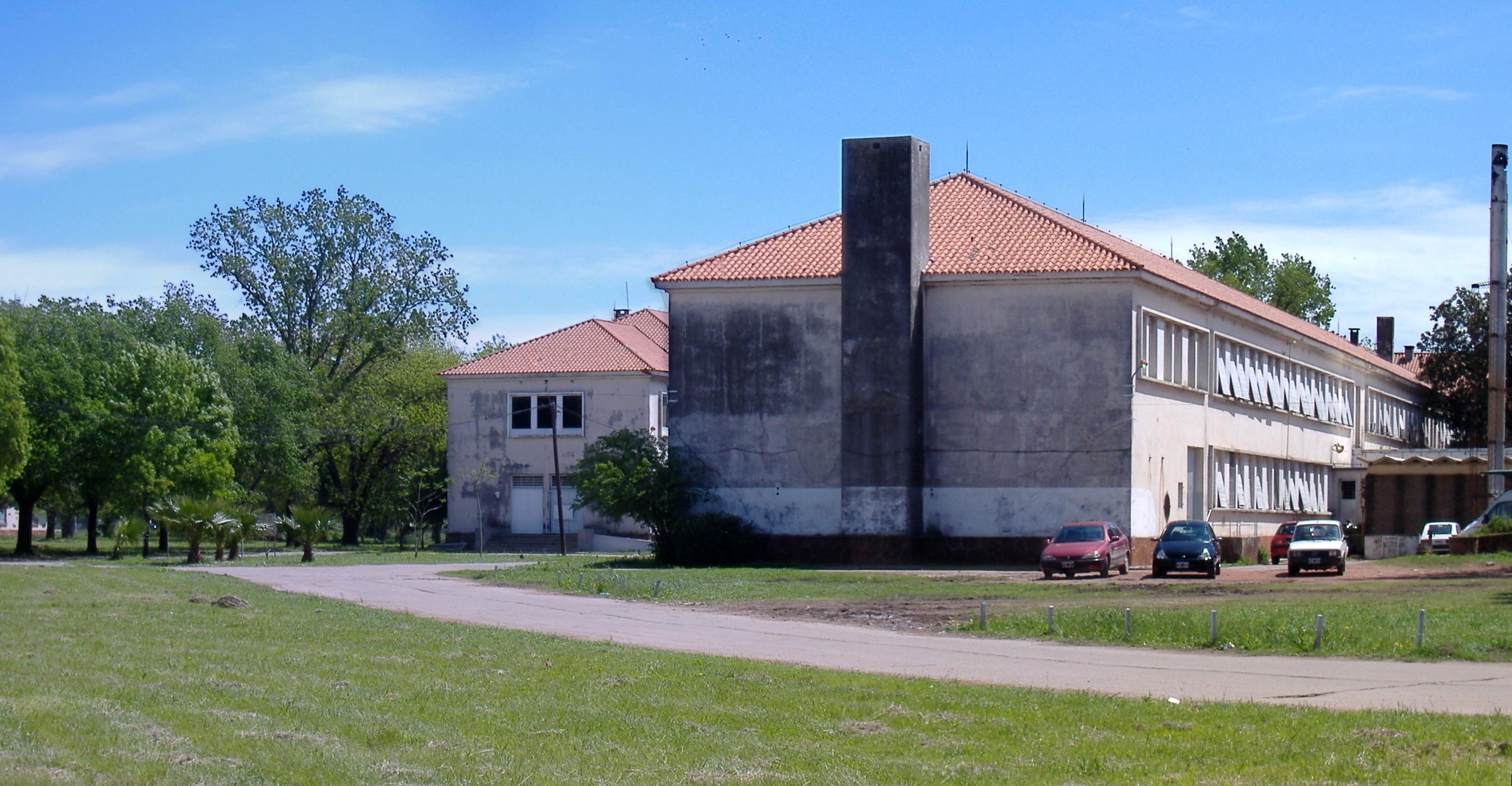 Hospital Escuela Eva Perón, a public hospital in Granadero Baigorria, near Rosario, Santa Fe, Argentina.